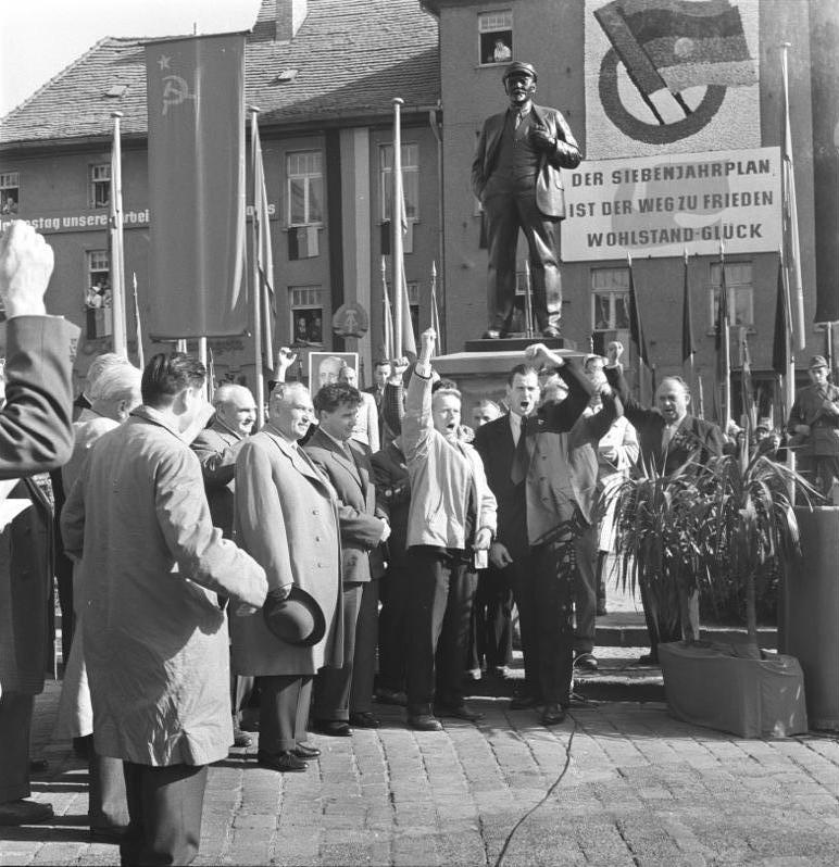 Eisleben, Lenindenkmal, sowjetischer Delegation Zentralbild/Junge, 11.10.1959 Lenin-Ehrung mit der sowjetischen Delegation in Eisleben Auf ihrer Fahrt zum Walzwerk Hettstedt machte die sowjetische Partei- und Regierungsdelegation am 10.10.1959 einen Zwischenaufenthalt in der Bergarbeiterstadt Eisleben, um dort mit einer Kranzniederlegung am Lenin-Denkmal das Andenken des großen Führers der proletarischen Revolution zu ehren. UBz: Die sowjetische Delegation wird in Eisleben begrüßt. [Hinter Denkmal Plakat mit Text "Der Siebenjahrplan ist der Weg zu Frieden, Wohlstand, Glück"]